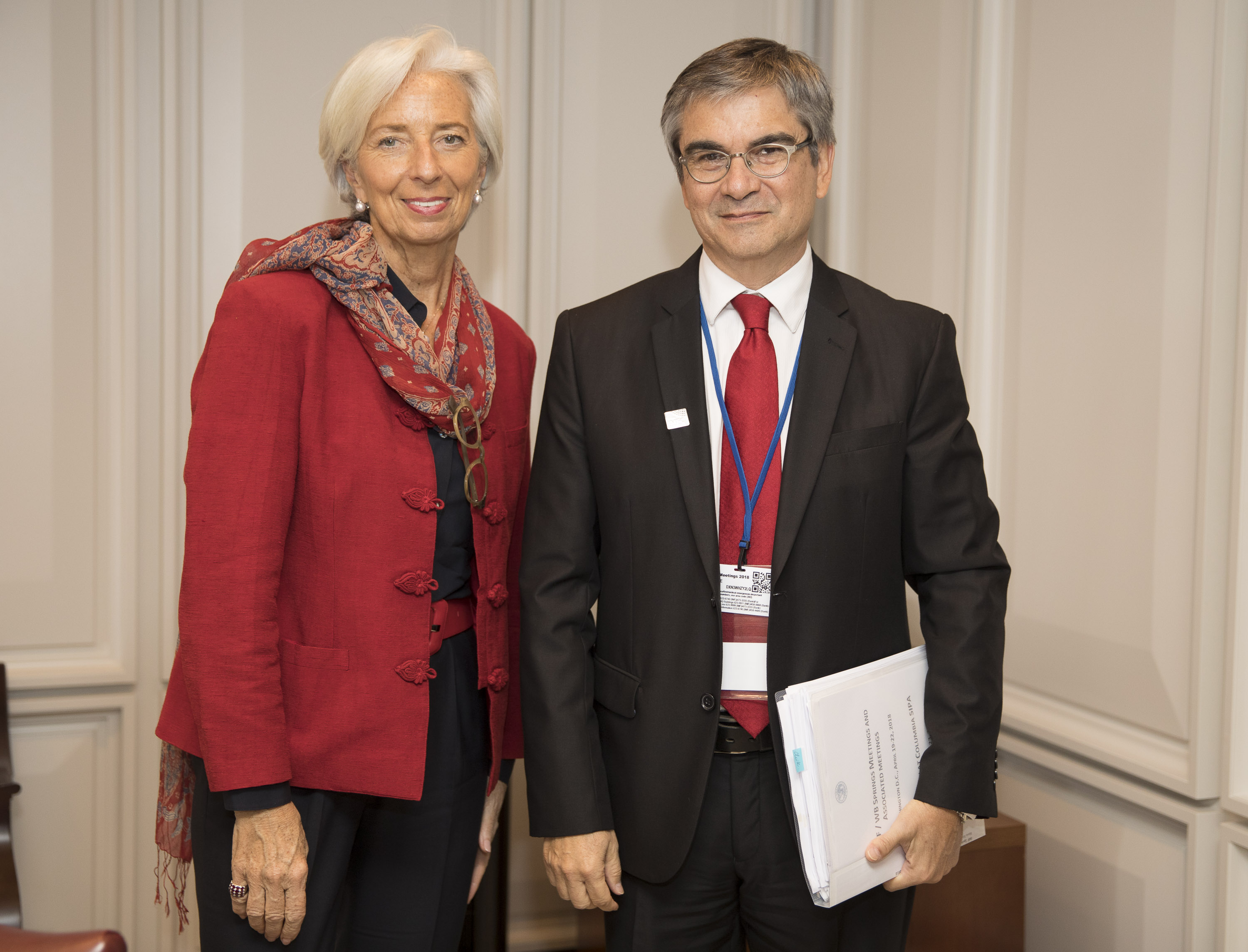 El Presidente del Banco Central Mario Marcel se reunió con la directora gerente del FMI, Christine Lagarde. 21 de abril de 2018.